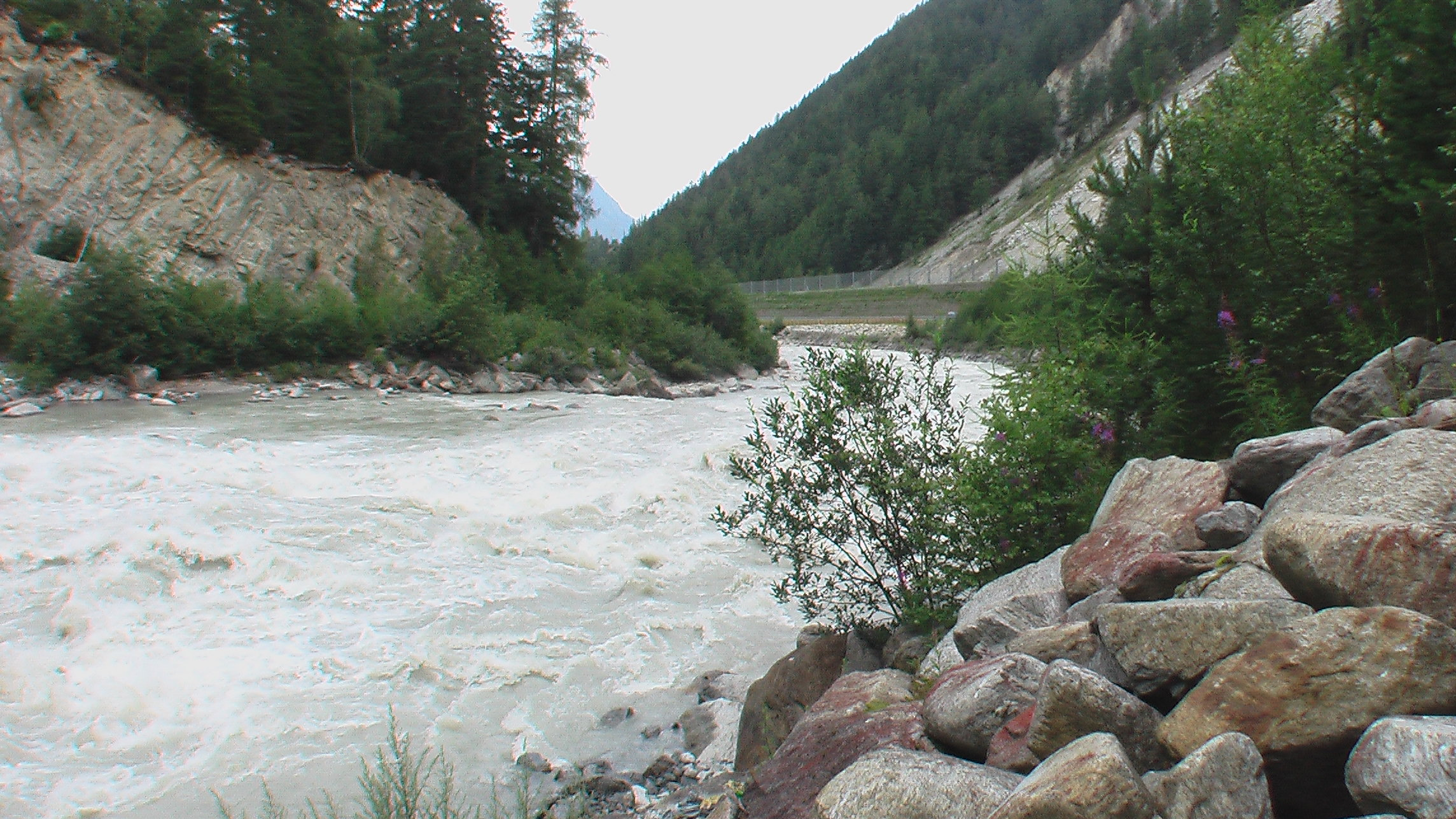 KofelsÖtztalerAche